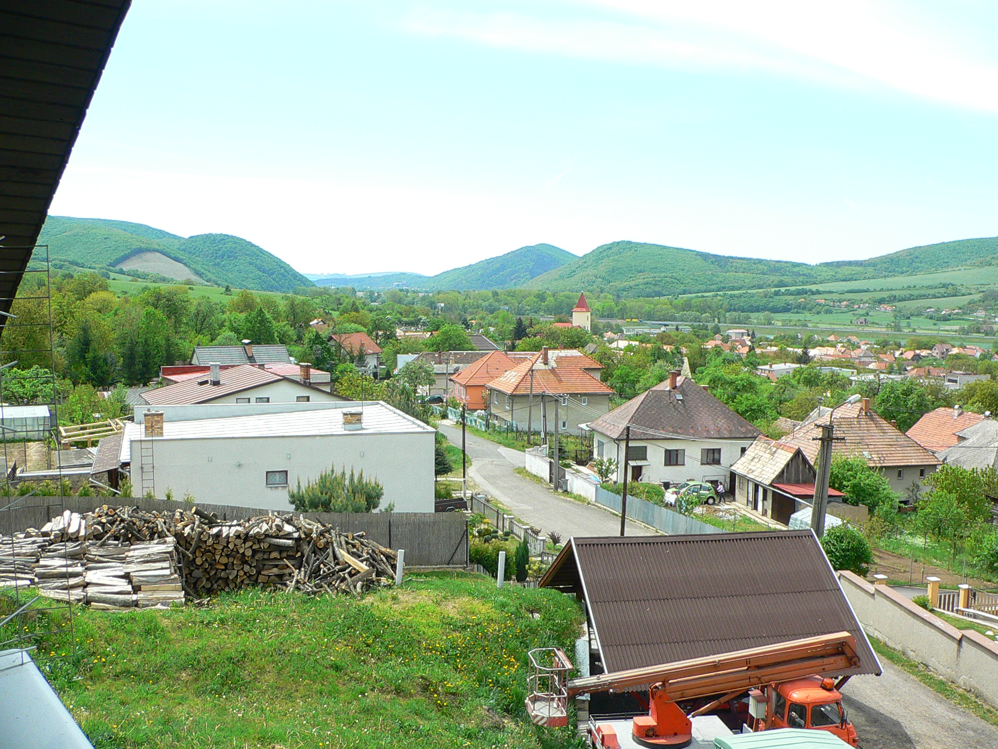 Tekovska Breznica